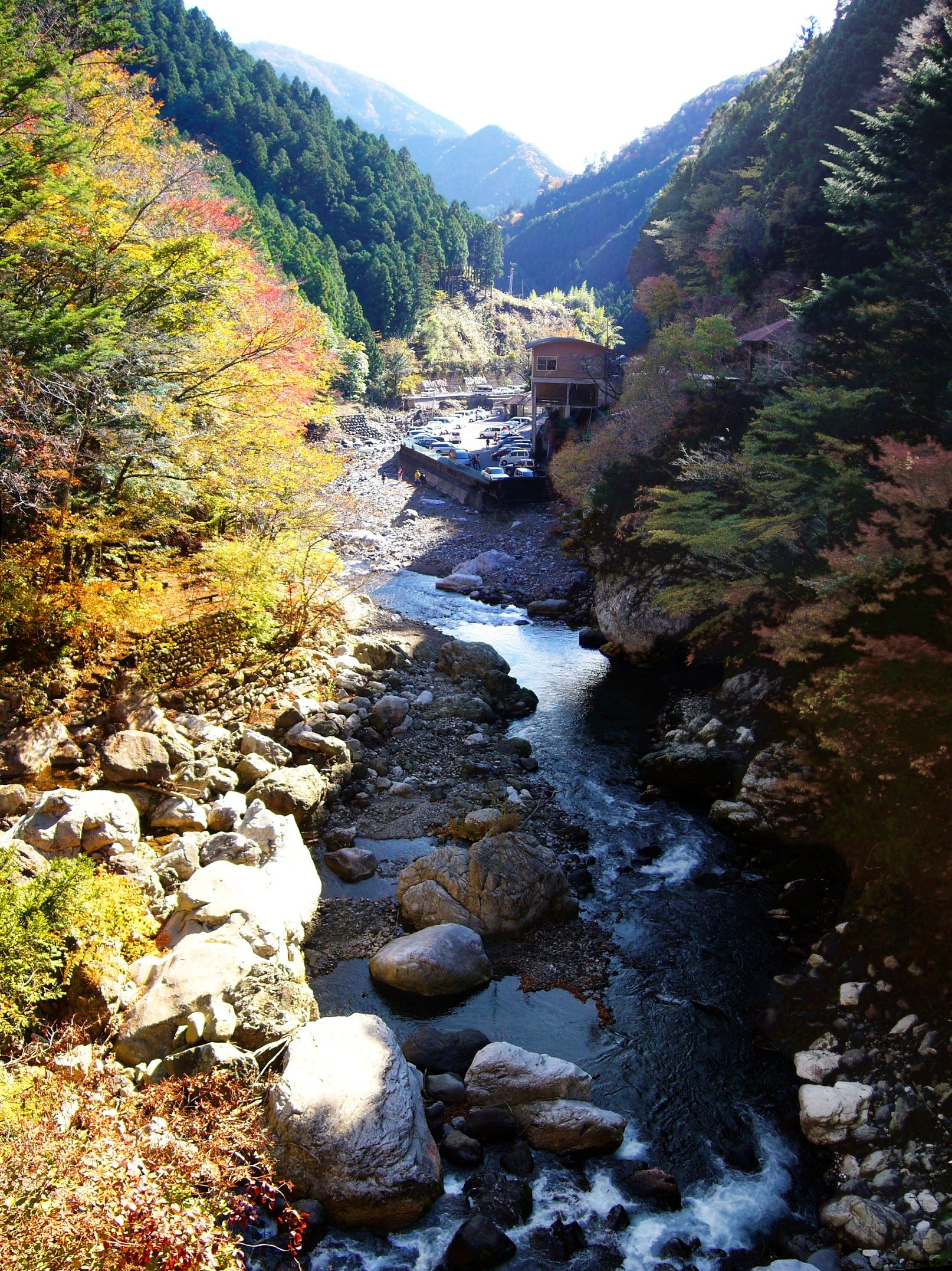 物部町 別府峡谷